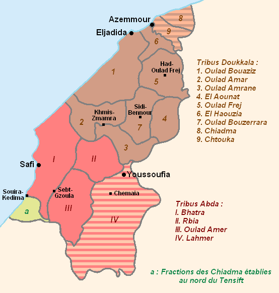 Carte représentant les tribus au sein des deux confédérations tribales de Doukkala et Abda. Une partie de la fraction Oulad Elhaj des Chiadma, établie au nord du Oued Tensift, dépend administrativement de la région Doukkala-Abda.